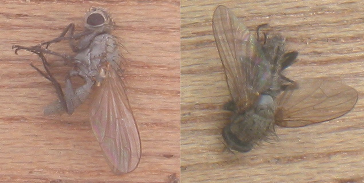 (Koolvlieg) Delia brassicae